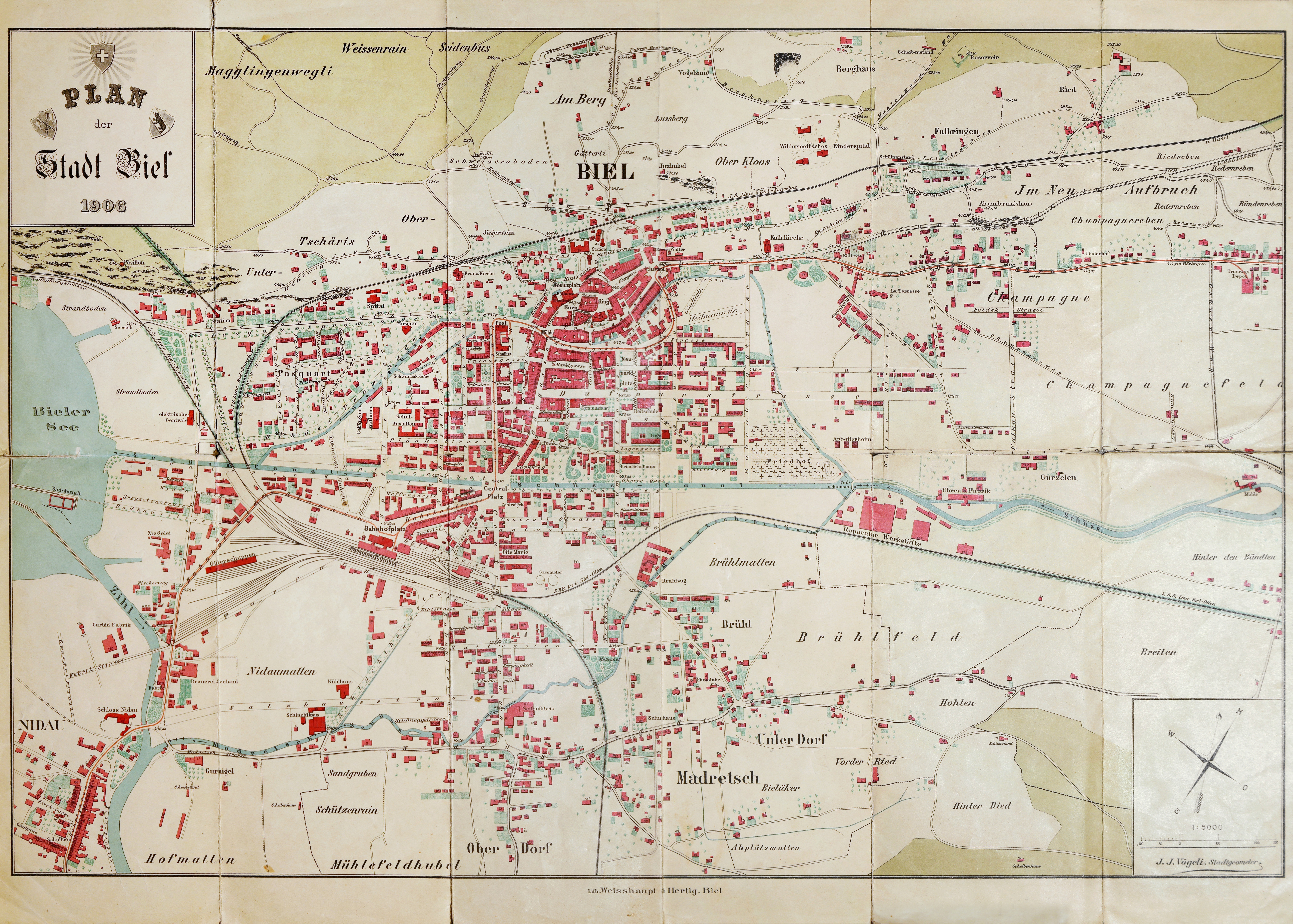 Plan der Stadt Biel 1906